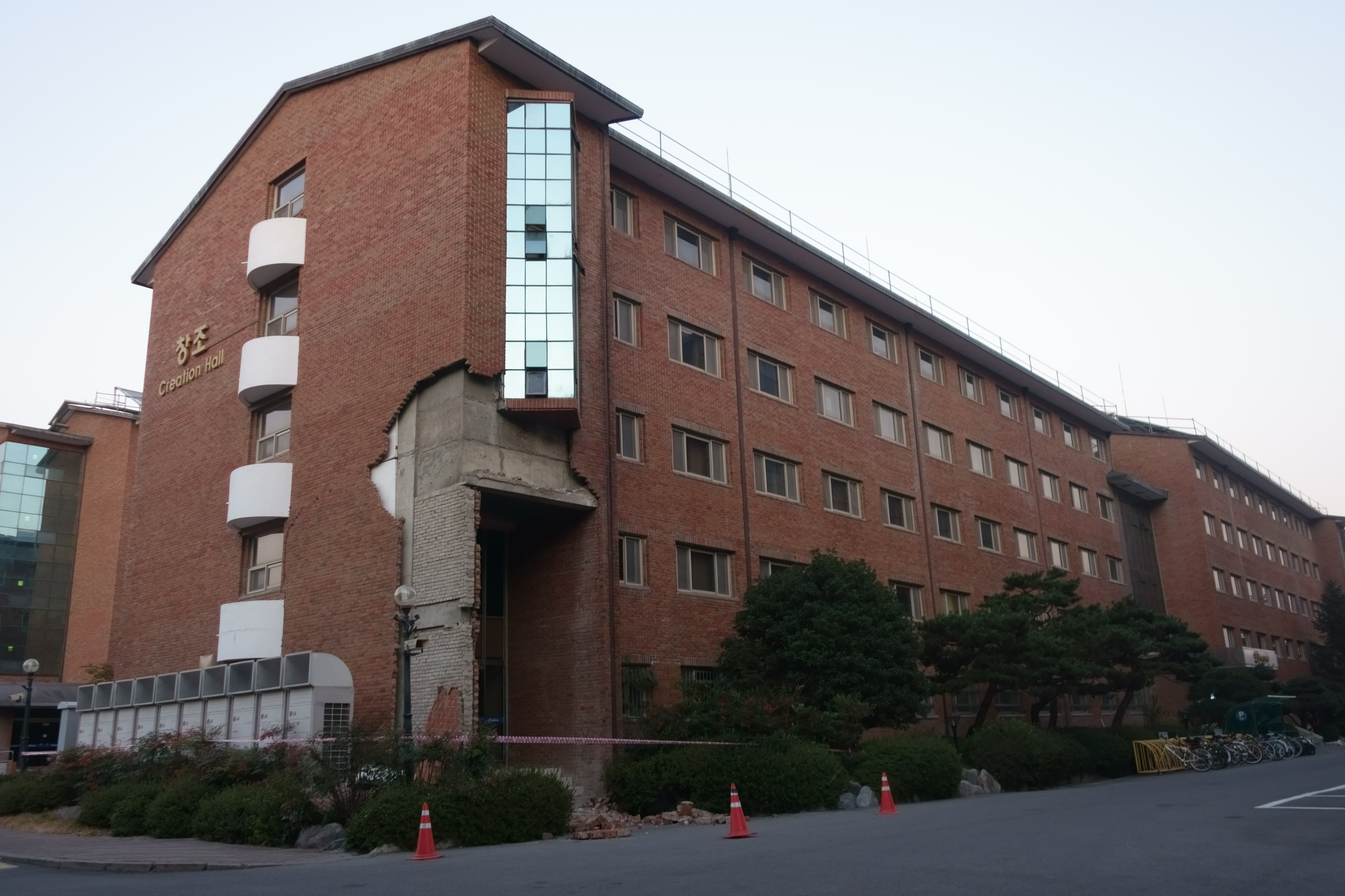 지진으로 피해를 입은 한동대학교